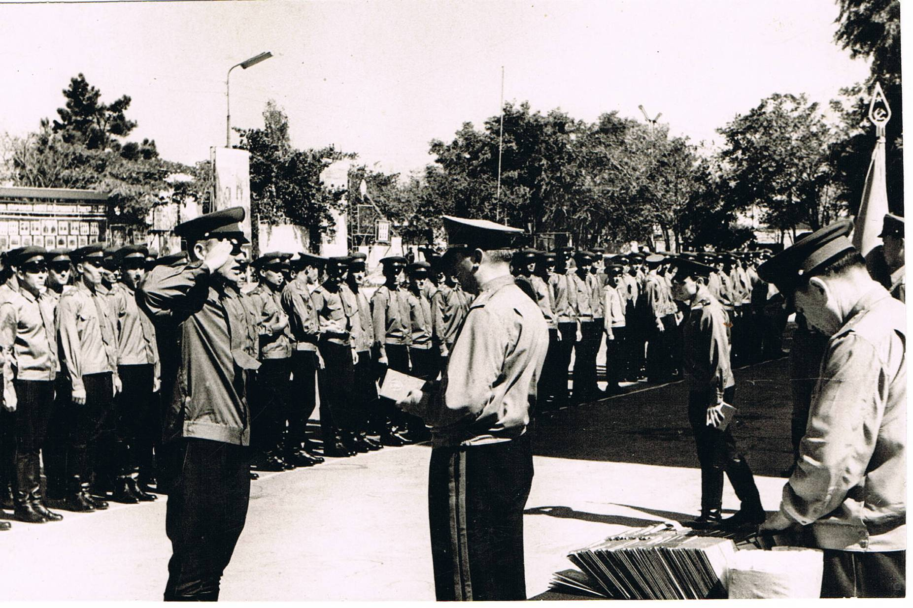 Генерал армии Куркоткин С.К. вручает золотую медаль выпускнику БВОКУ лейтенанту Дорофееву А.А. Баку 1968.